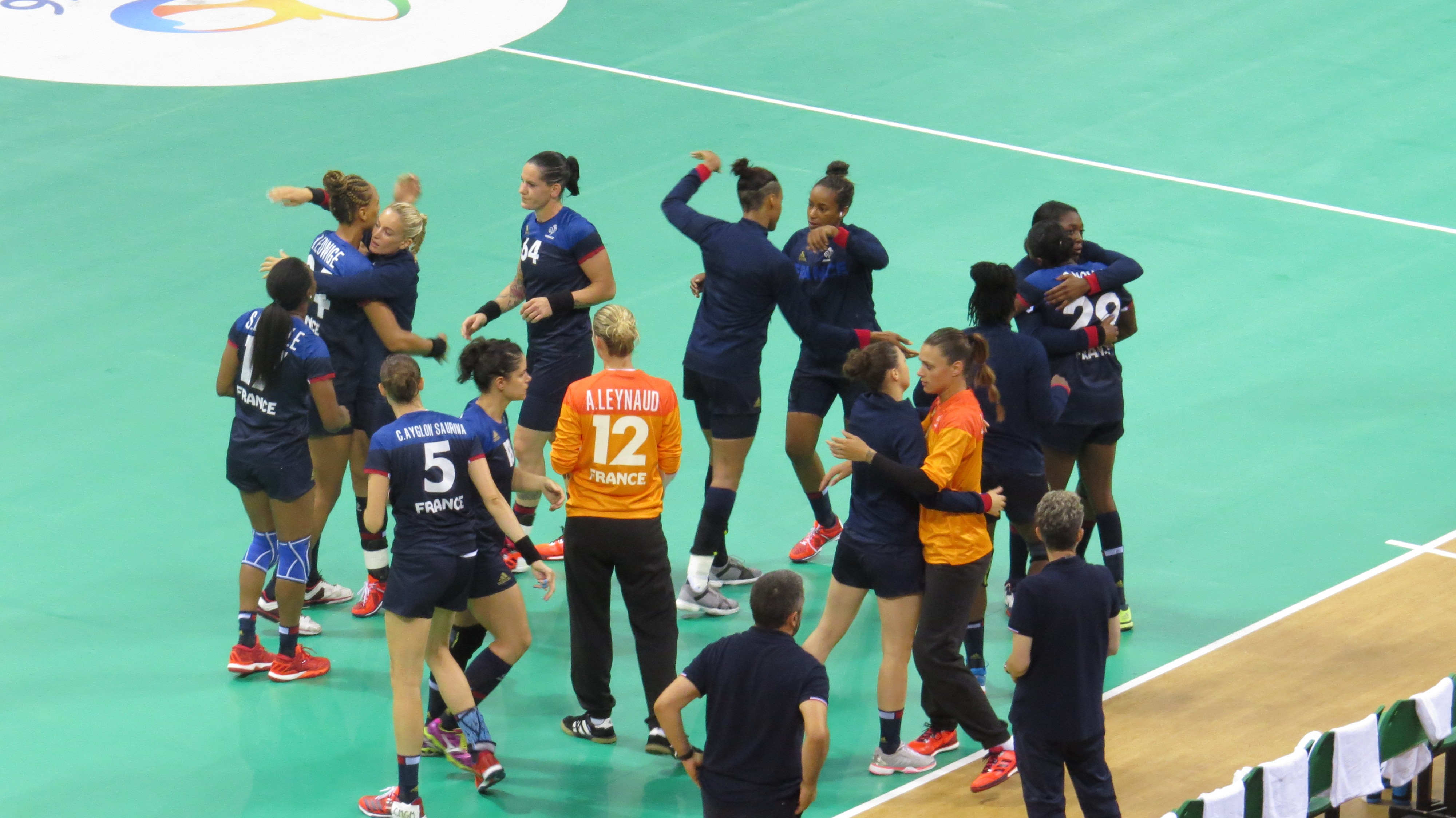 Rio 2016. sx 97